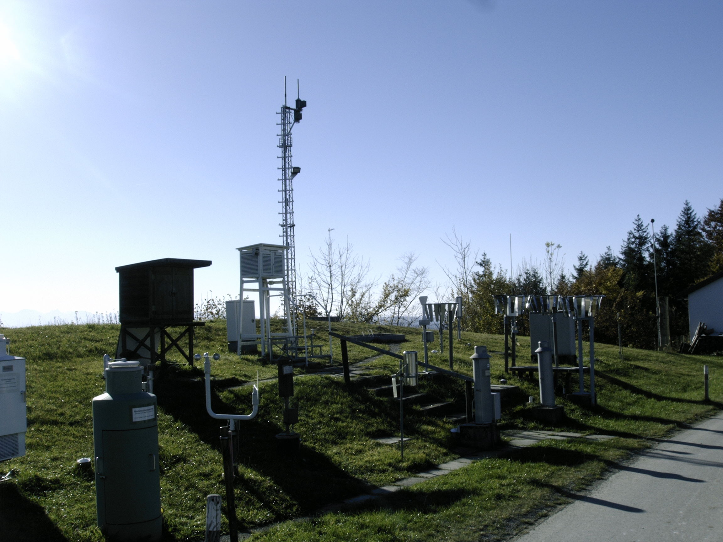 Hohenperißenberg Observatorium Messfeld